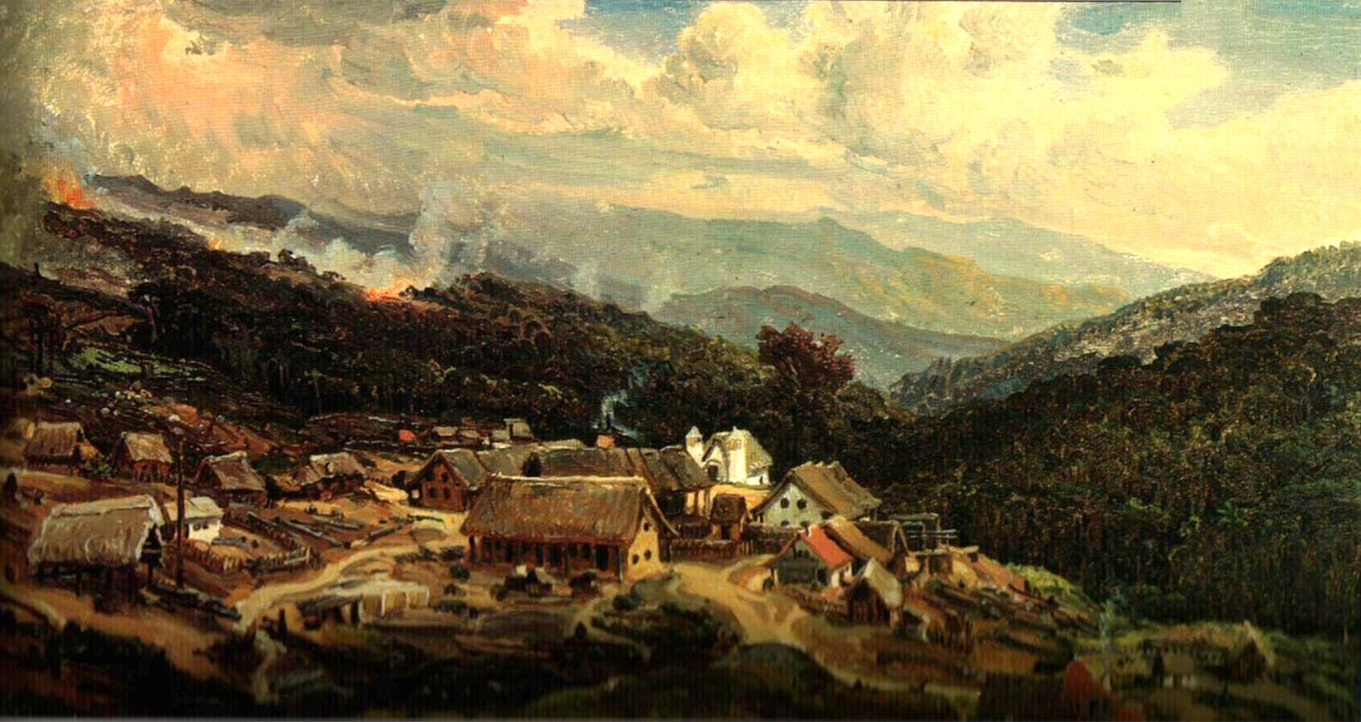 La colonia alemana de Tovar. 1844. Oleo sobre tela. 16,8 x 32 cm. Colecion de Museo Estadales en Berlin.